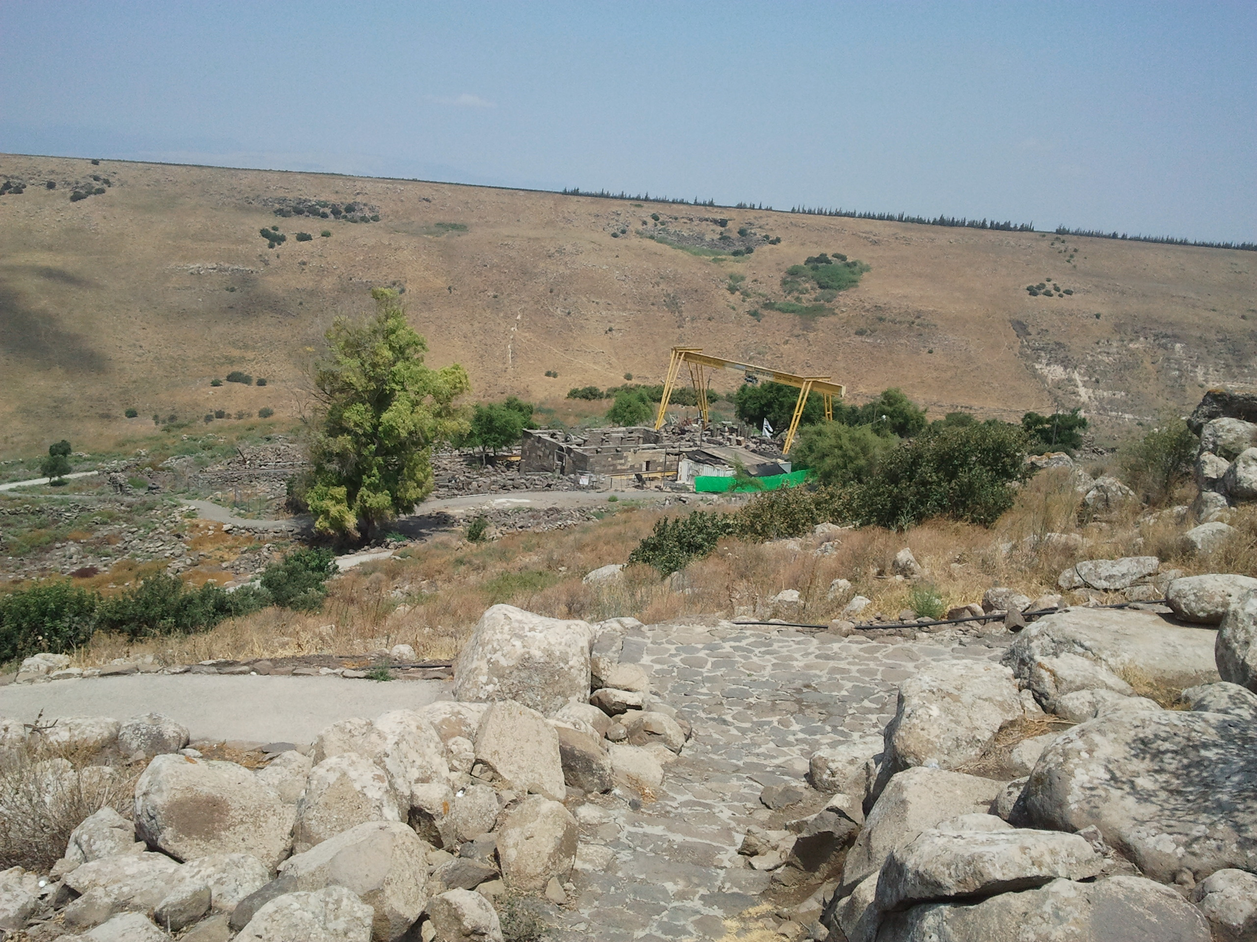 אום אל-קנאטר הוא כפר קדום על הגדה המזרחית של ואדי א-שביב, יובל של נחל סמך, כשני ק"מ מדרום מערב לקיבוץ נטור ברמת הגולן.